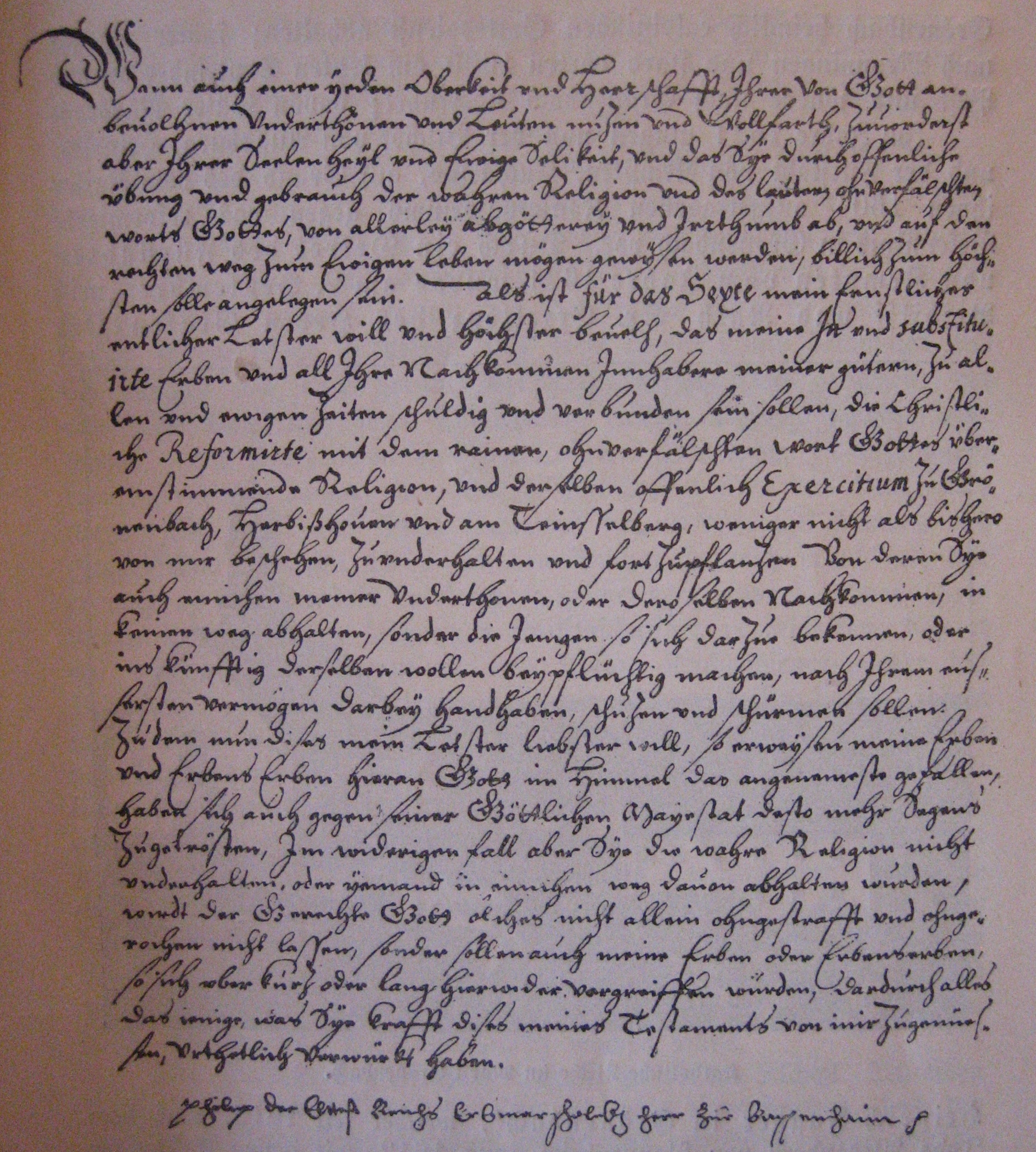 Testament Philipp von Pappenheims, 1613